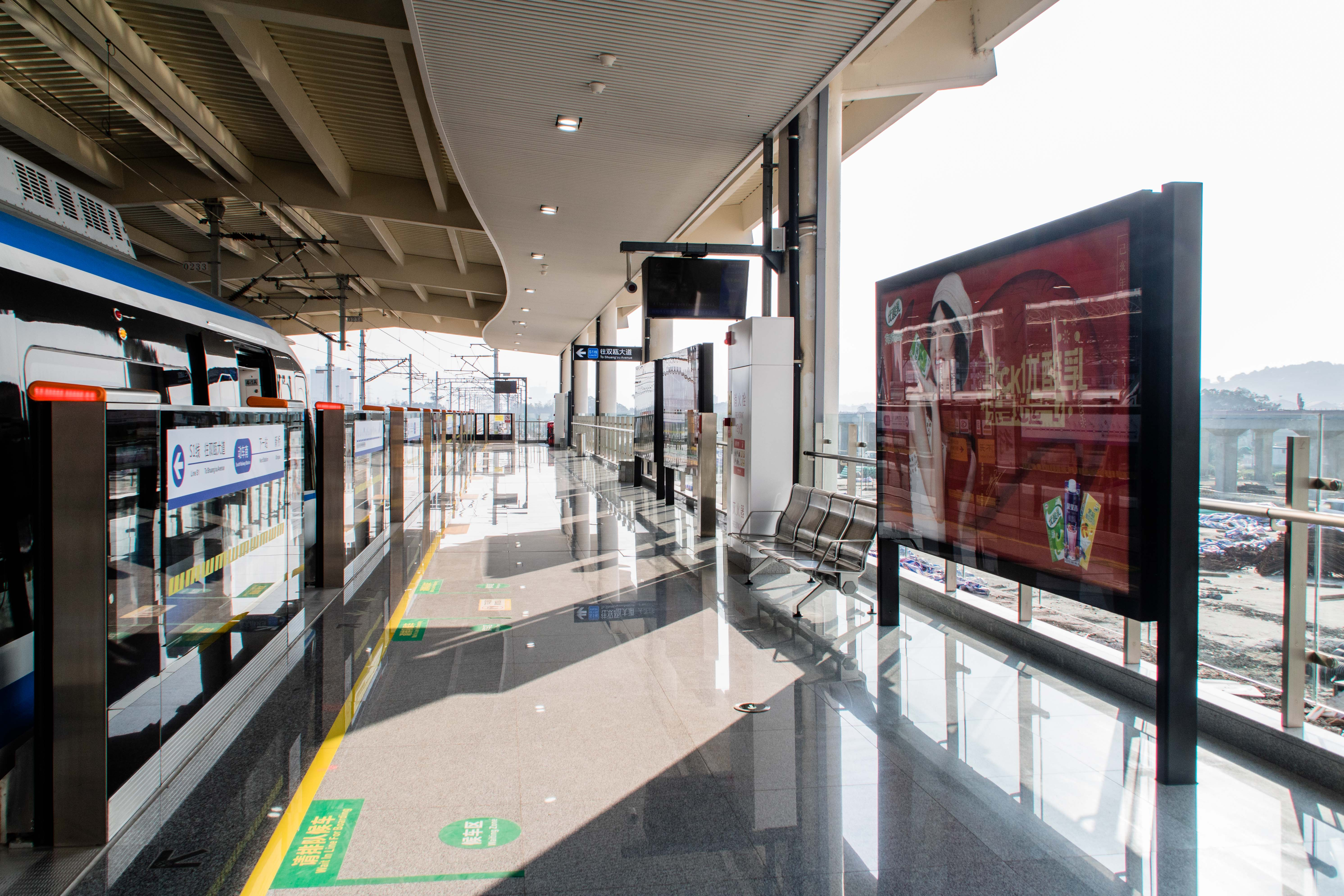 中文（中国大陆）: 动车南站往双瓯大道方向站台